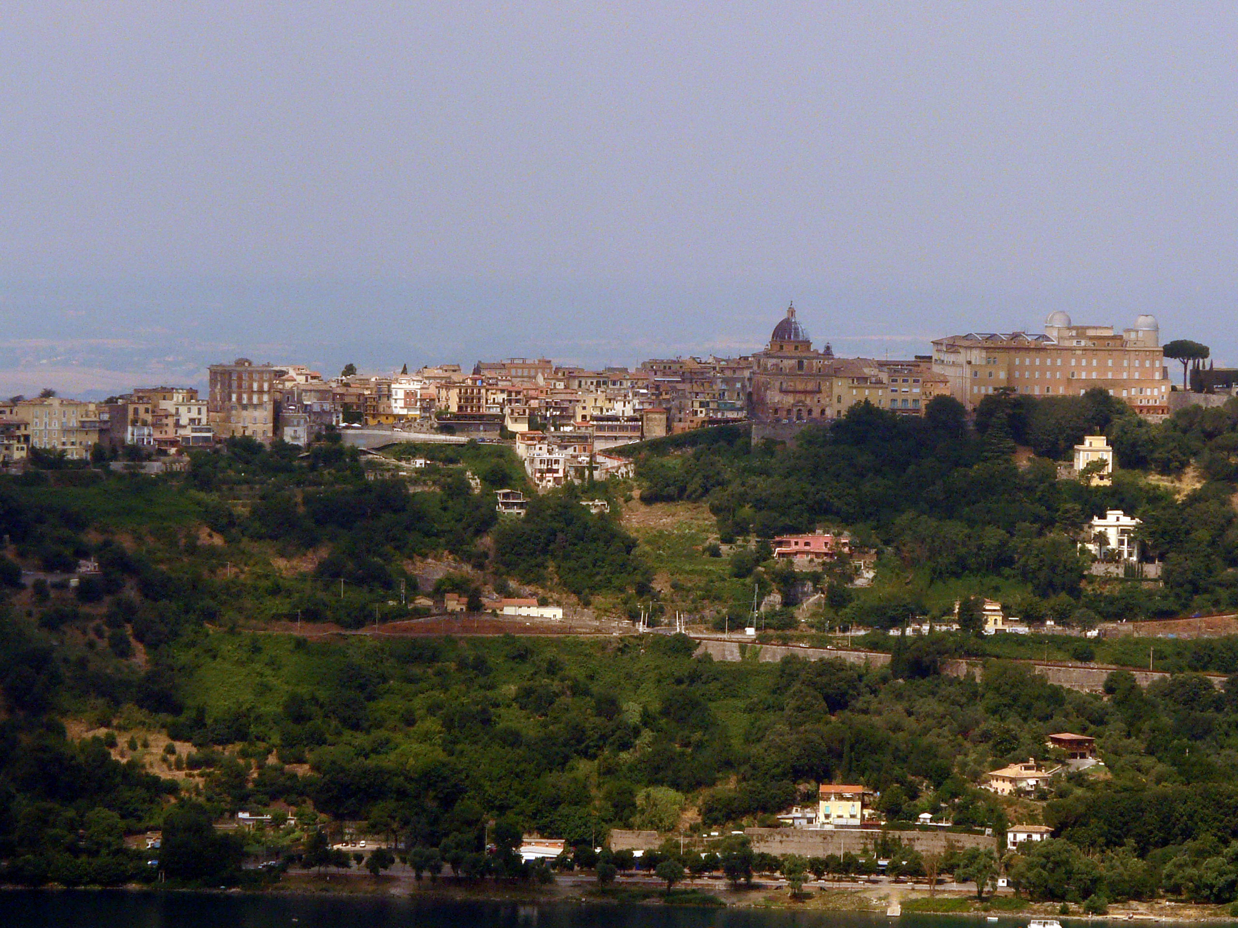 Caste Gandolfo